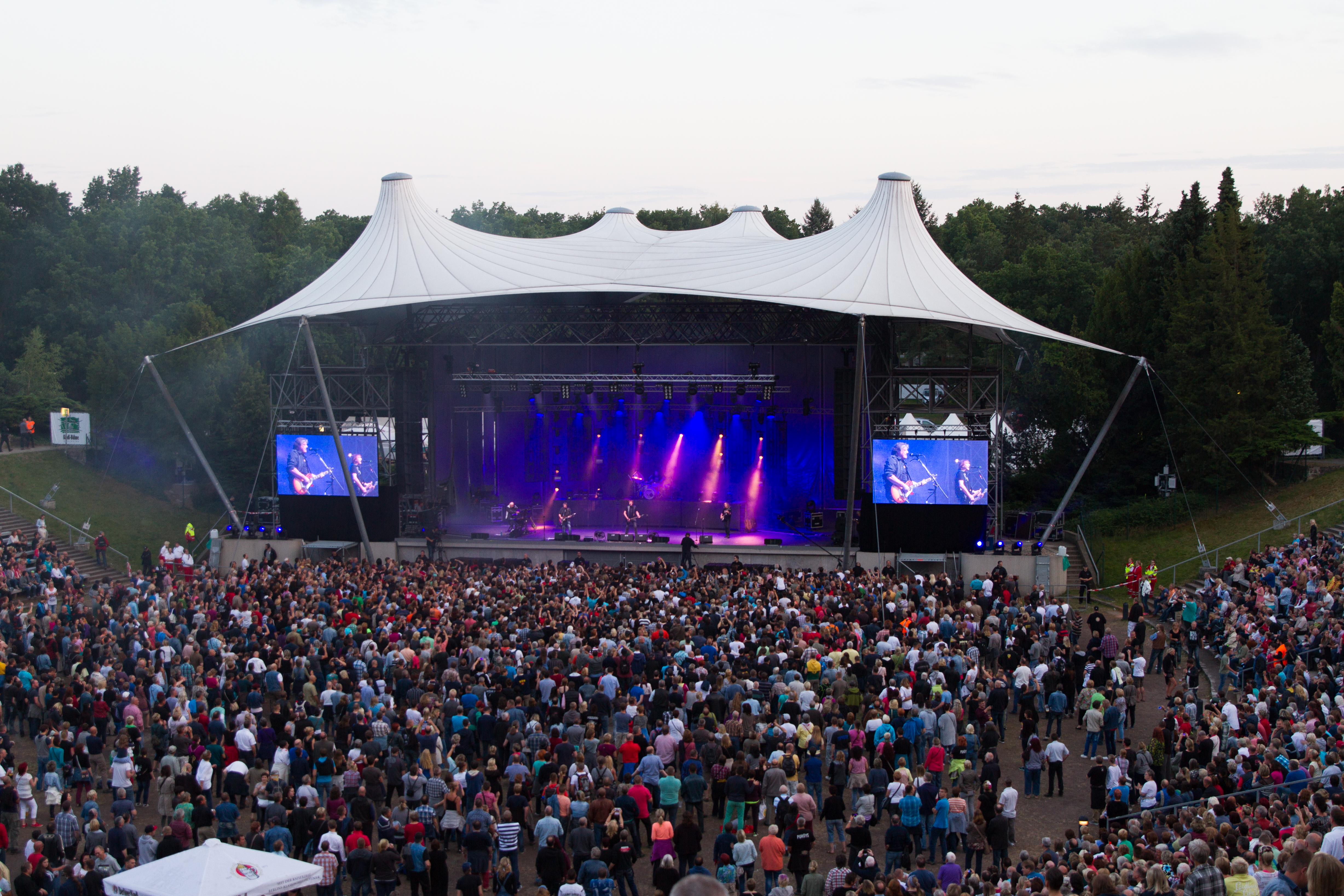 "Puhdys - Das große Abschiedskonzert 2015" in der Kindl-Bühne Wuhlheide